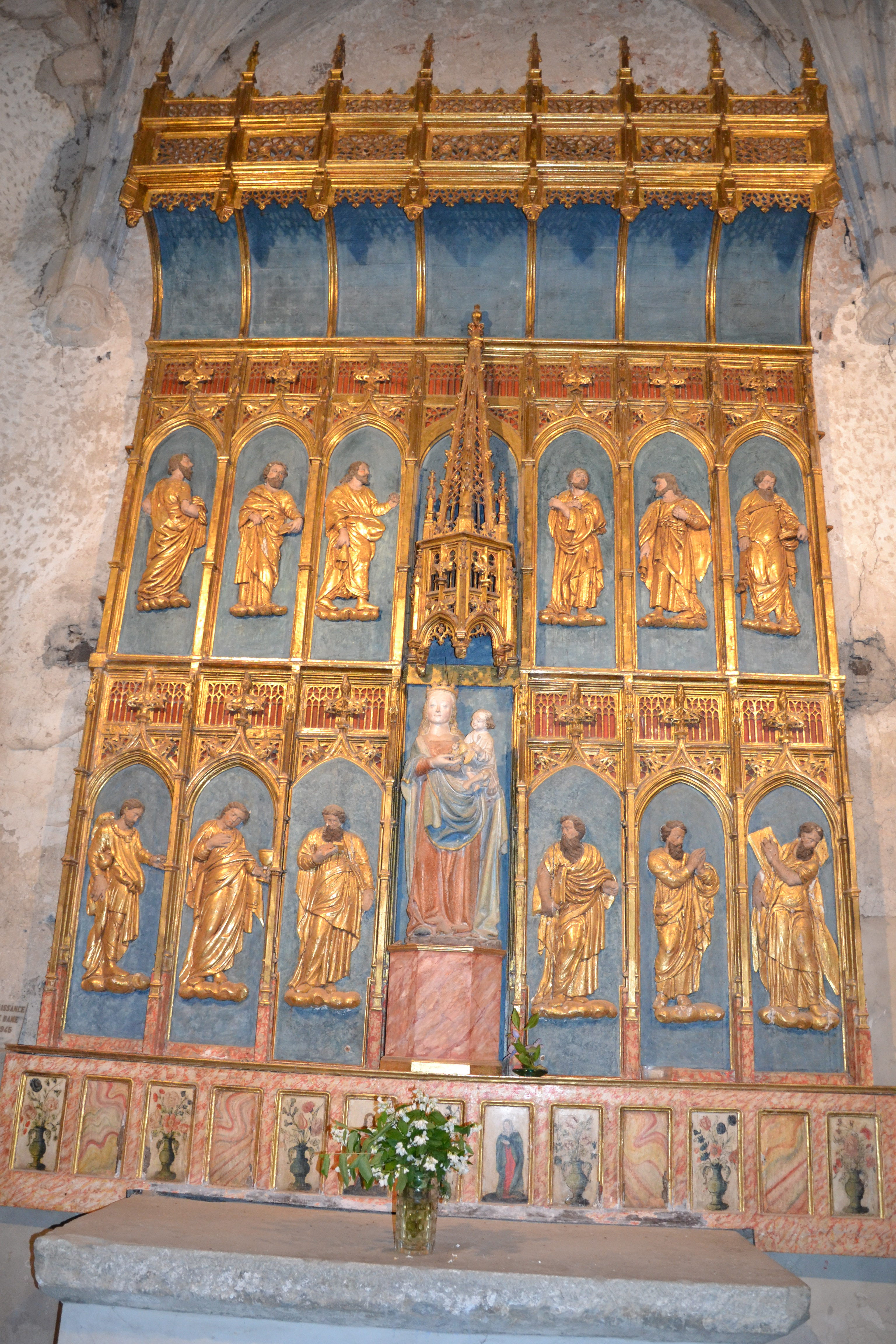 Retable de la chapelle Notre Dame de la Barthe de l'église Saint-Etienne de Mas-Cabardès